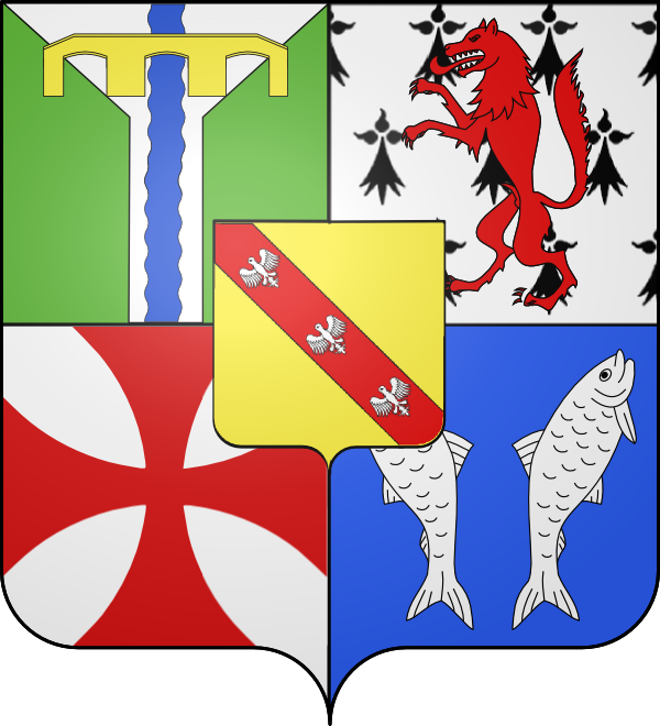 Blason de Domjevin inventé en 2010 non officiel (proposition de blason) correspondant à l'histoire du village. Ce blason est peut-être une "arme à enquerre" (non respect des règles de l'Héraldique) dans le premier quartier. Il n'est pas blasonné. Ne pas copier car ceci est un blason inventé !